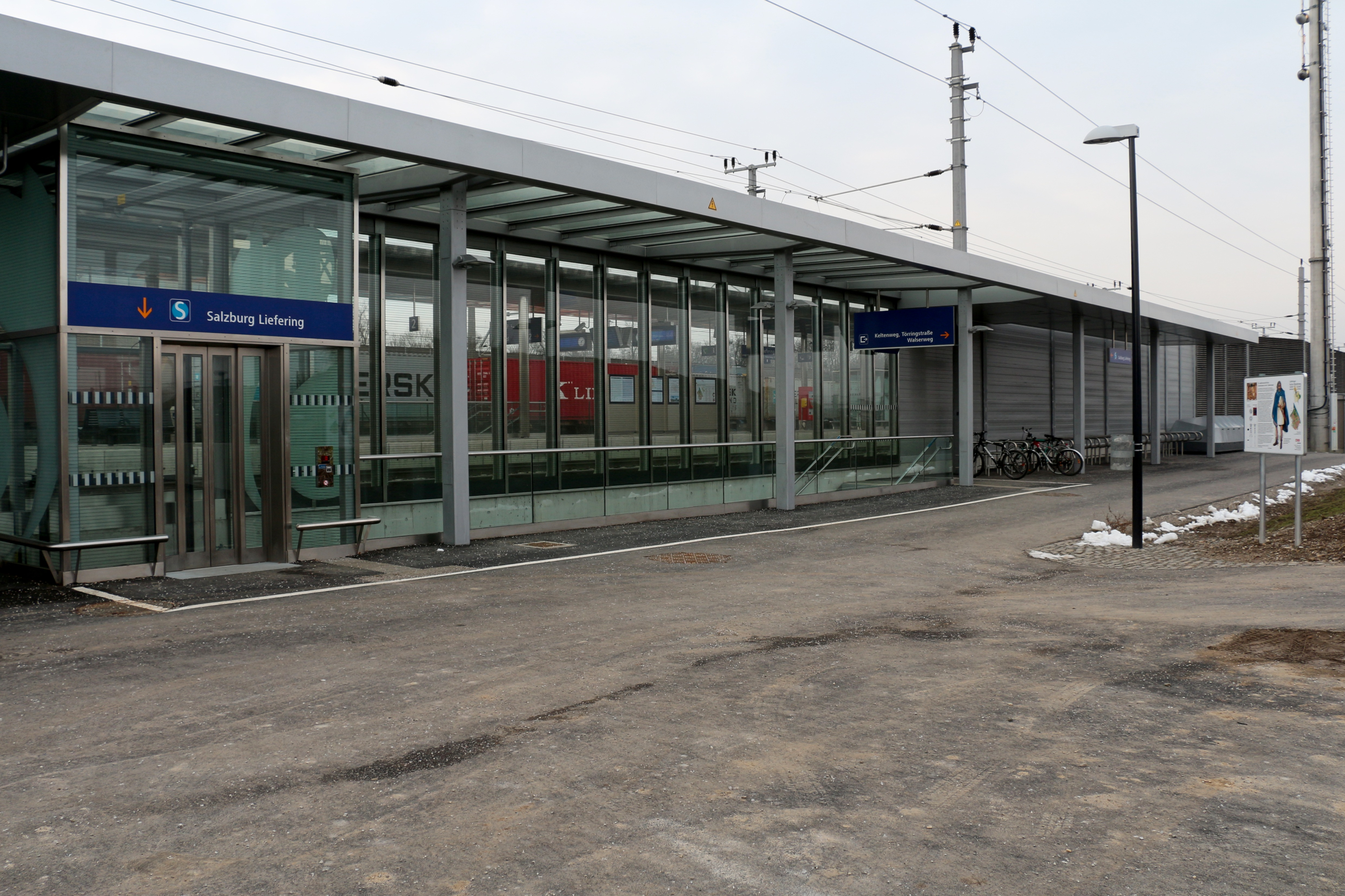 Die im Dezember 2013 in Betrieb genommene S-Bahn-Haltestelle Salzburg-Liefering; Außenbereich.